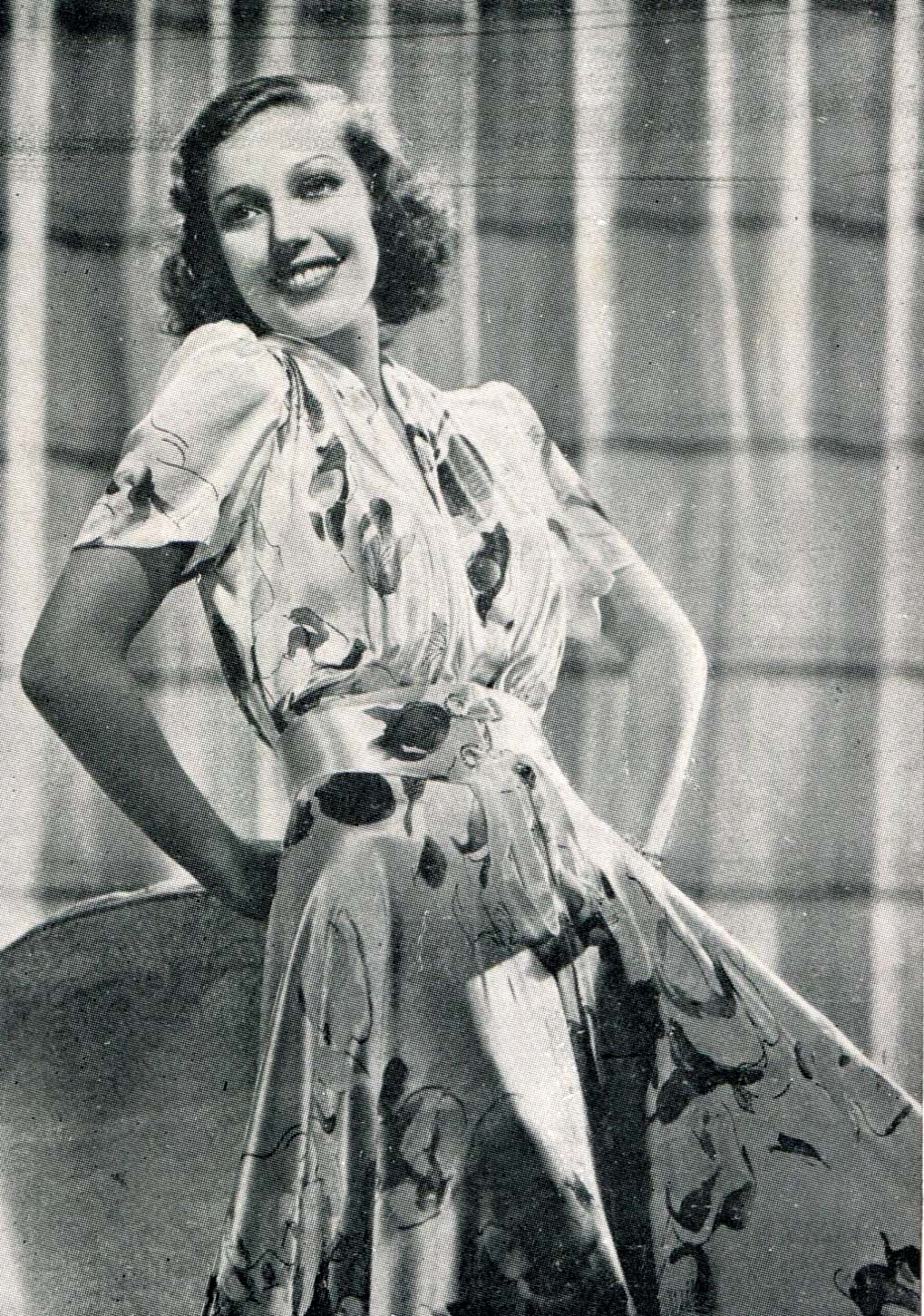 L'attrice Loretta Young in un'immagine pubblicata in Italia nel luglio 1936